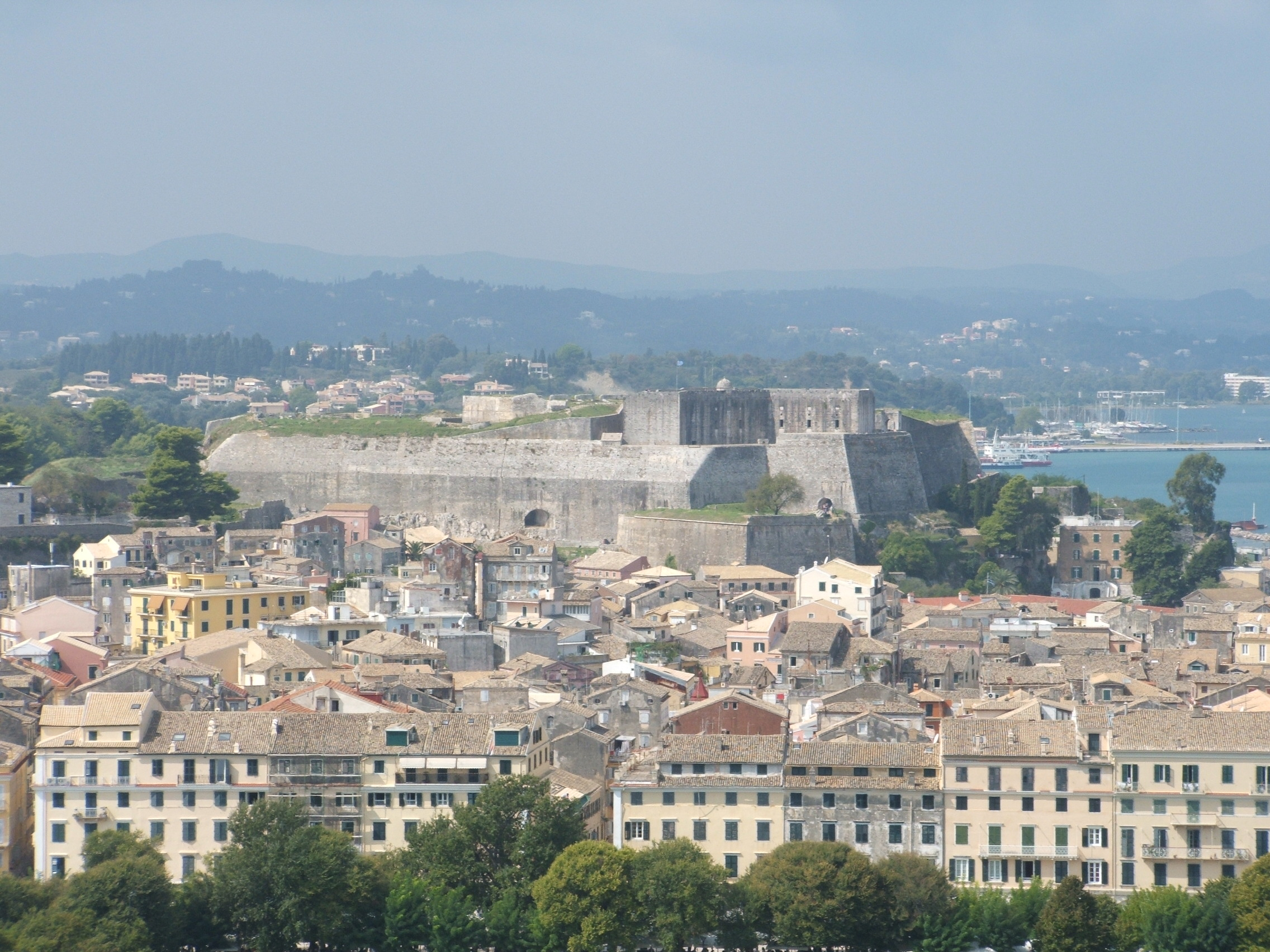 Isla de Corfú en Grecia. Fotografía de su fortaleza.